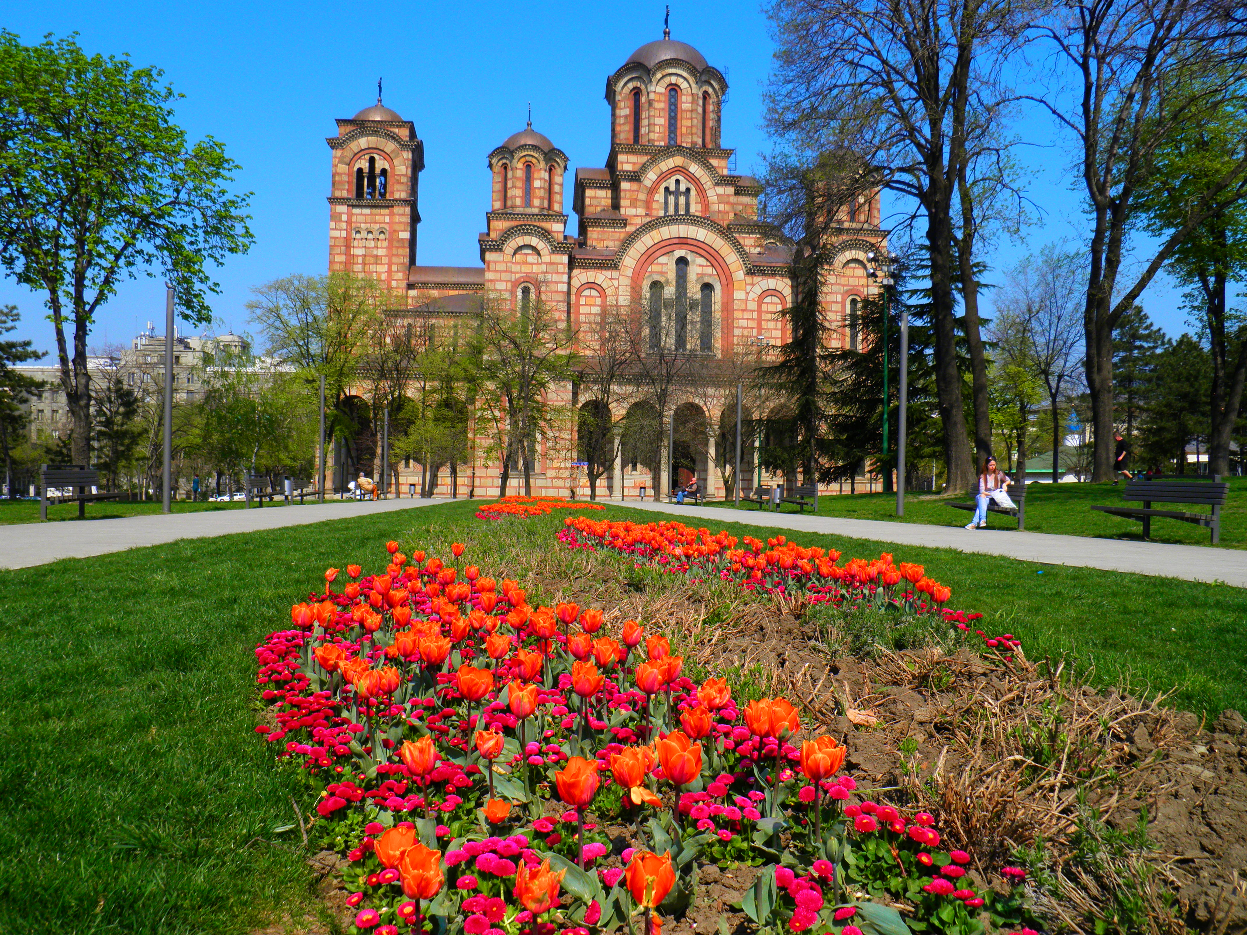 Crkva Svetog Marka